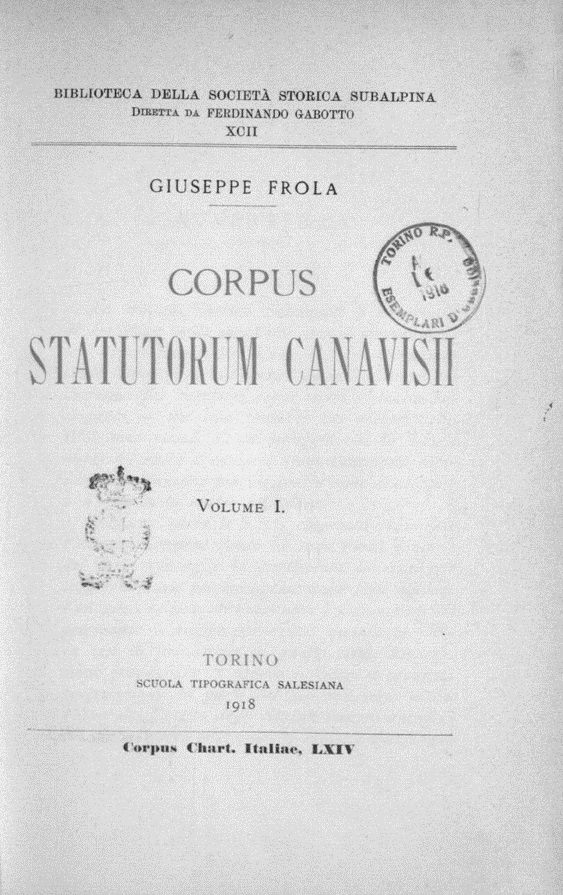 Frontespizio